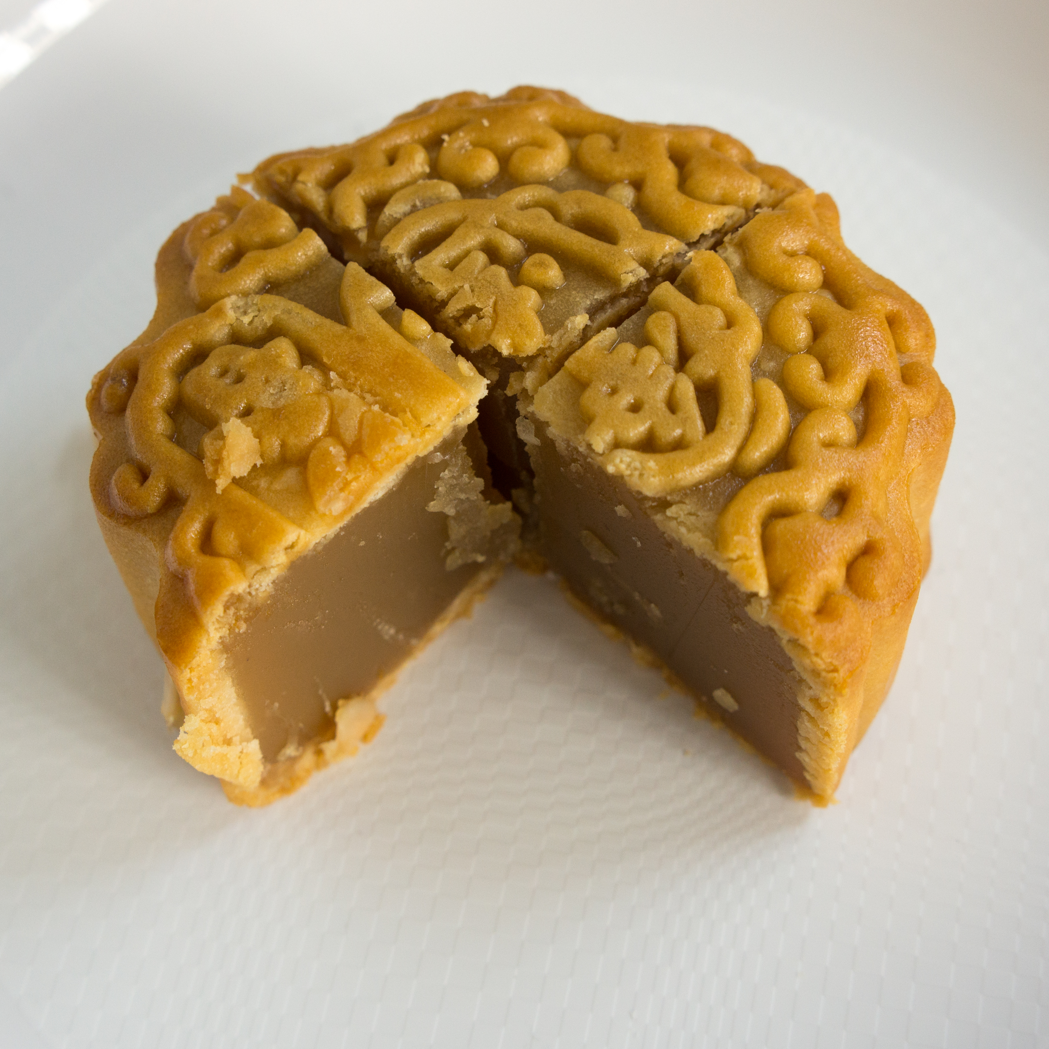 Mooncake à la pâte de graines de lotus.